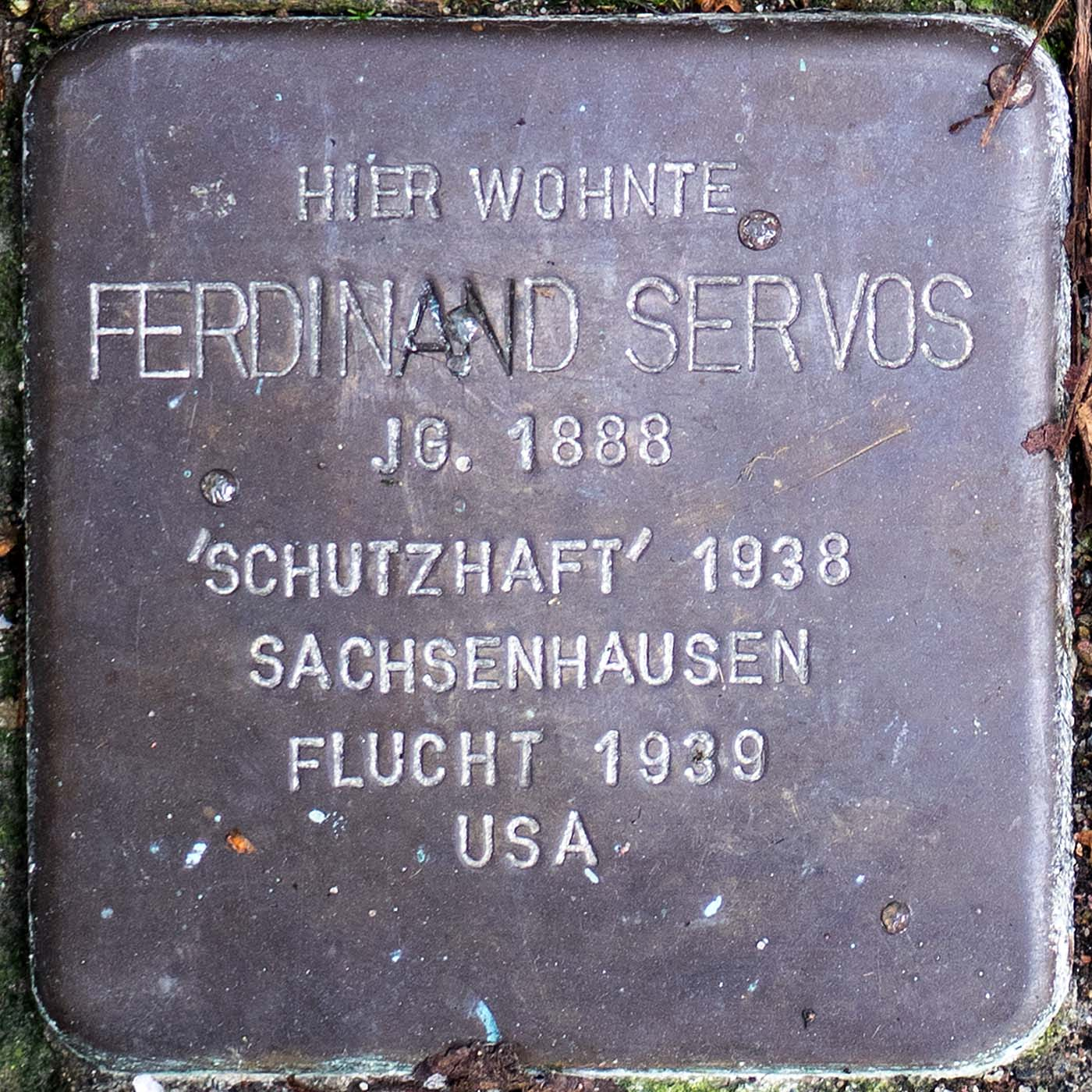 Stolperstein für Ferdinand Servos (Willich)